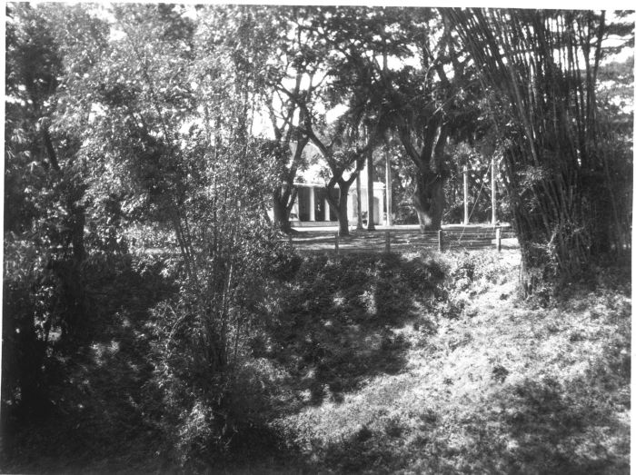 Foto. Het residentiehuis te Bondowoso op Oost-Java